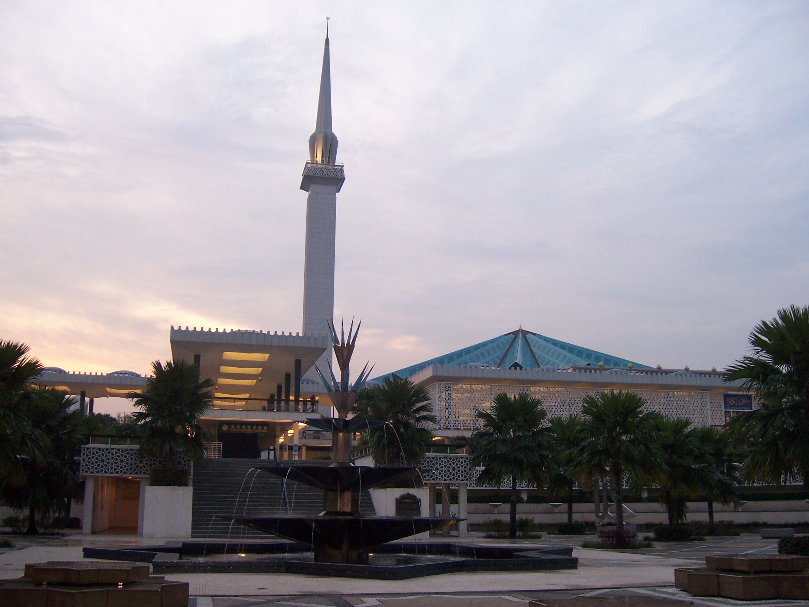 National mosque, Kuala Lumpur, Malaysia